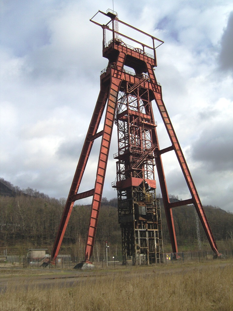 chevalement du puits ST-FONTAINE